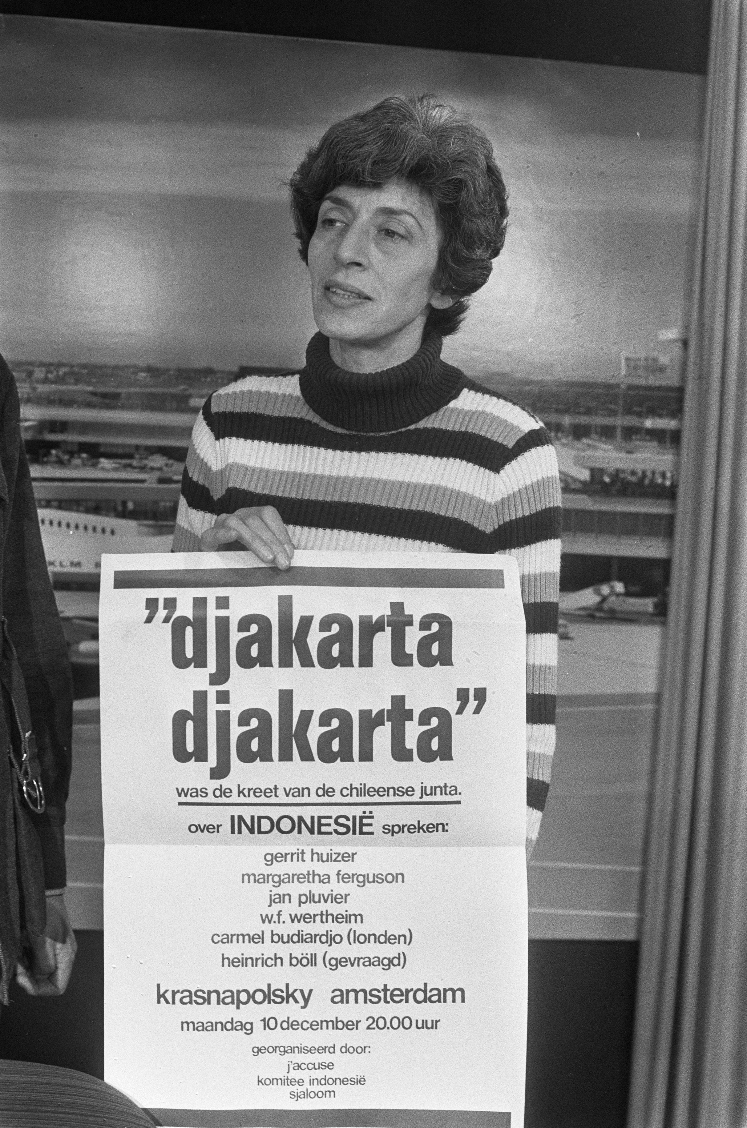 Collectie / Archief : Fotocollectie Anefo Reportage / Serie : Carmel Budiardjo, een Engelse mensenrechtenactiviste die in Indonesische gevangenissen heeft gezeten, geeft een persconferentie op Schiphol Beschrijving : De activiste met een poster Datum : 8 december 1973 Locatie : Noord-Holland, Schiphol Trefwoorden : mensenrechtenactivisten, persconferenties, posters Persoonsnaam : Budiardjo, Carmel Fotograaf : Fotograaf Onbekend / Anefo Auteursrechthebbende : Nationaal Archief Materiaalsoort : Negatief (zwart/wit) Nummer archiefinventaris : bekijk toegang 2.24.01.05 Bestanddeelnummer : 926-8762